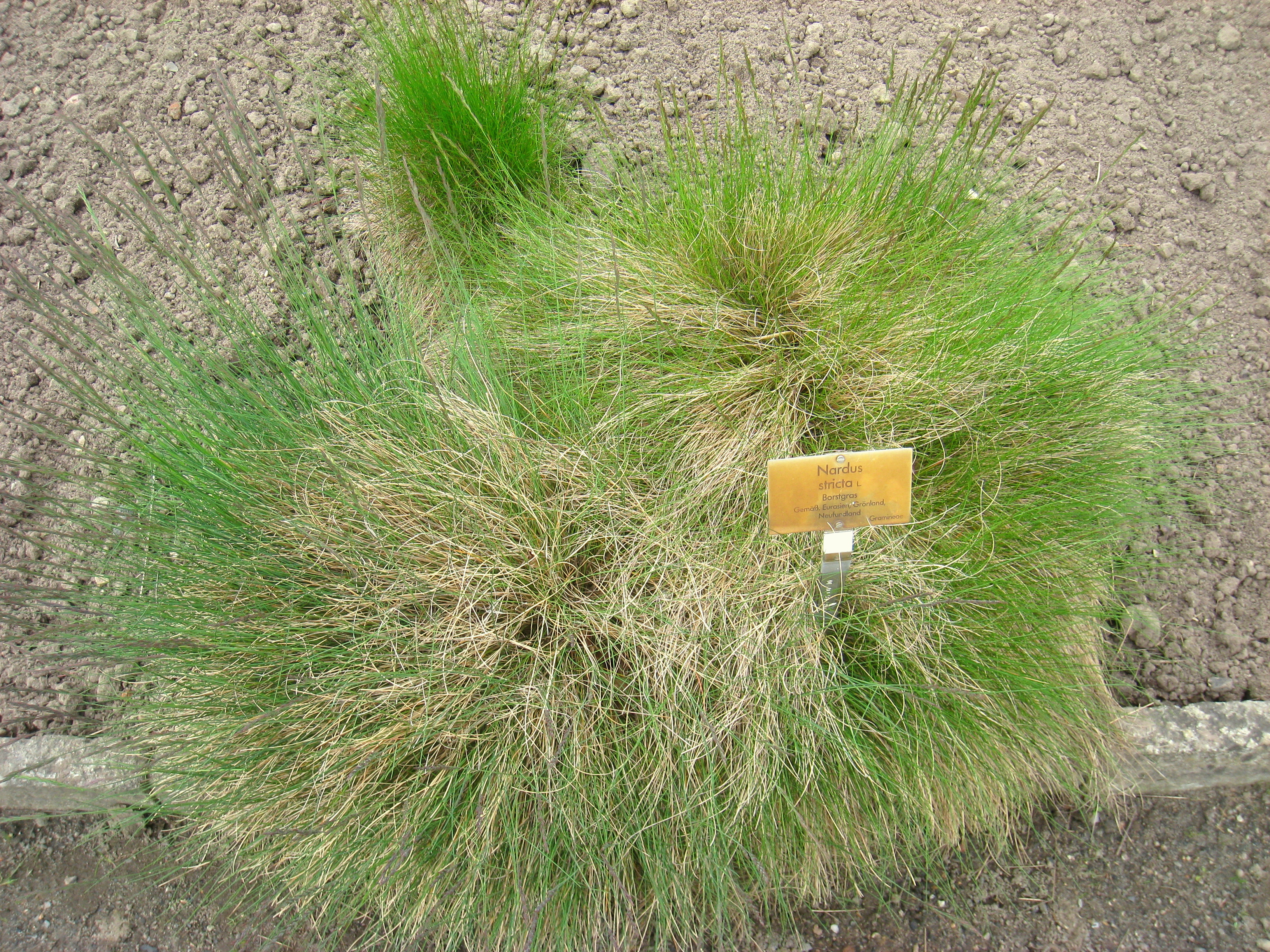 Nardus stricta specimen in the Botanischer Garten, Berlin-Dahlem (Berlin Botanical Garden), Berlin, Germany.